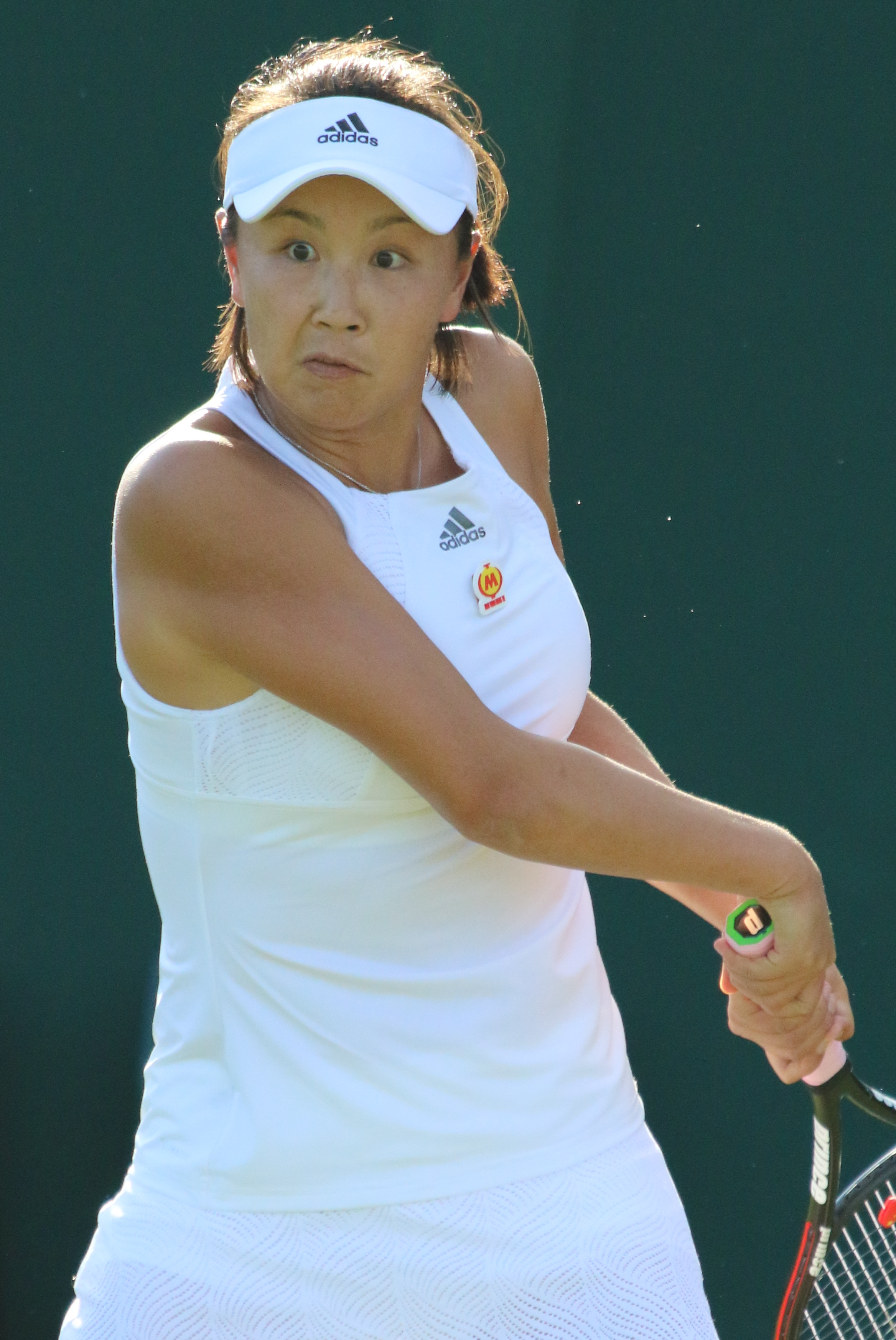 Peng WM17 (8)